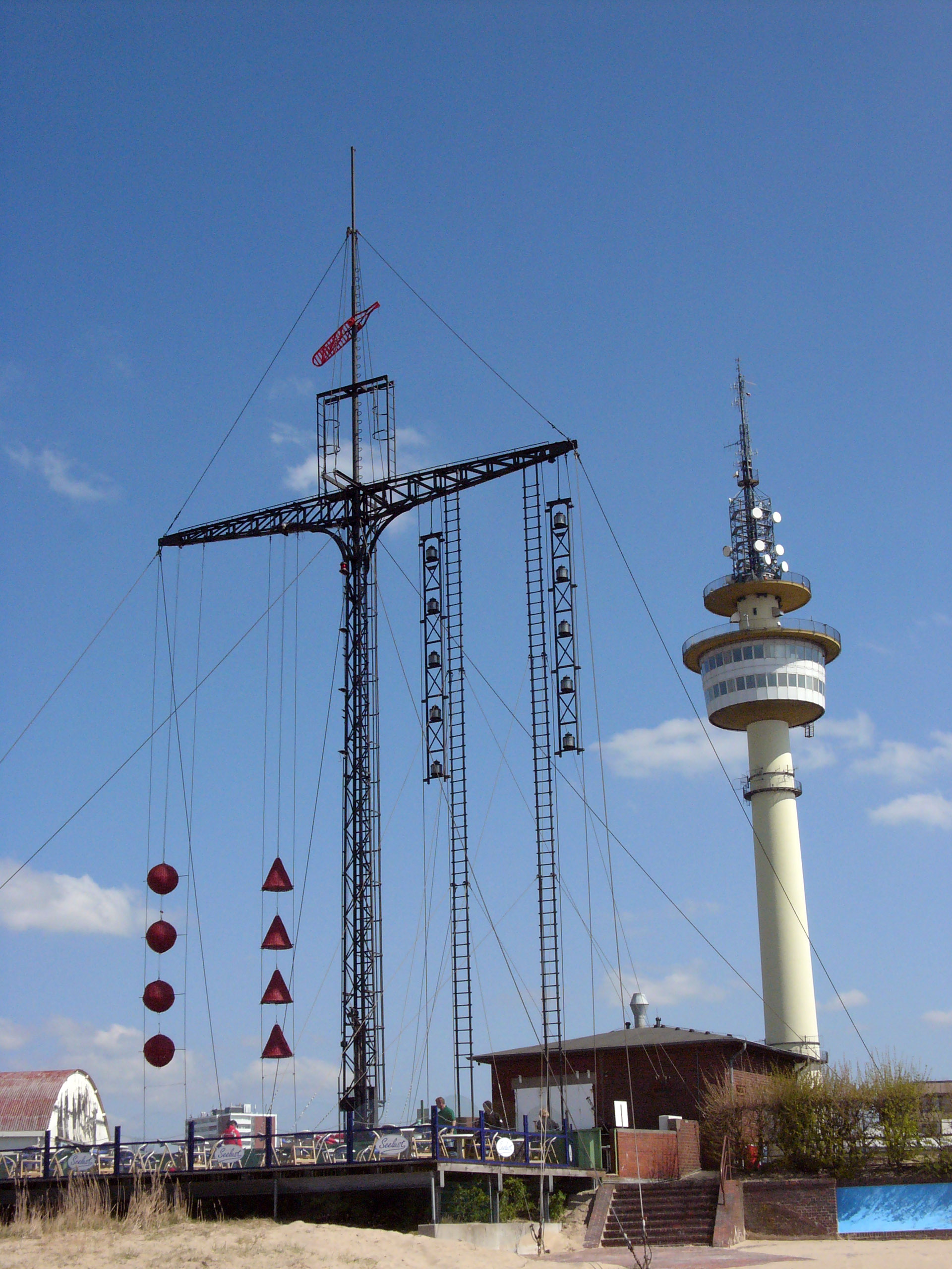 Water-gauge Wasserstandsanzeiger: Maritimes Denkmal von 1903, bis 1973 in Betrieb, jetzt kein offizielles Seezeichen mehr, Höhe: 32 m, in Europa vermutlich einzigartig. Durch Aufziehen der Bälle und Kegel zeigt er der Schiffahrt den Wasserstand der Weser im Bereich der Geestemündung an. Der Signalarm auf der Spitze zeigt auflaufendes, ablaufendes Wasser bzw. Stillstand an. Der Unterschied zwischen Hoch- und Niedrigwasser beträgt hier ca. 3,80 m. Der Anzeiger wurde für museale und touristische Zwecke restauriert und 2003 wieder in Betrieb genommen. Die Finanzierung erfolgte über die Stiftung Wohnliche Stadt, Vereine und engagierte Privatpersonen. Die Hochschule Bremerhaven realisierte den automatischen Betrieb und eine elektrische Schautafel. Das abgebildete Objekt ist ein geschütztes Kulturdenkmal in der Freien Hansestadt Bremen, mit der Nr. 1520 beim Landesamt für Denkmalpflege registriert.